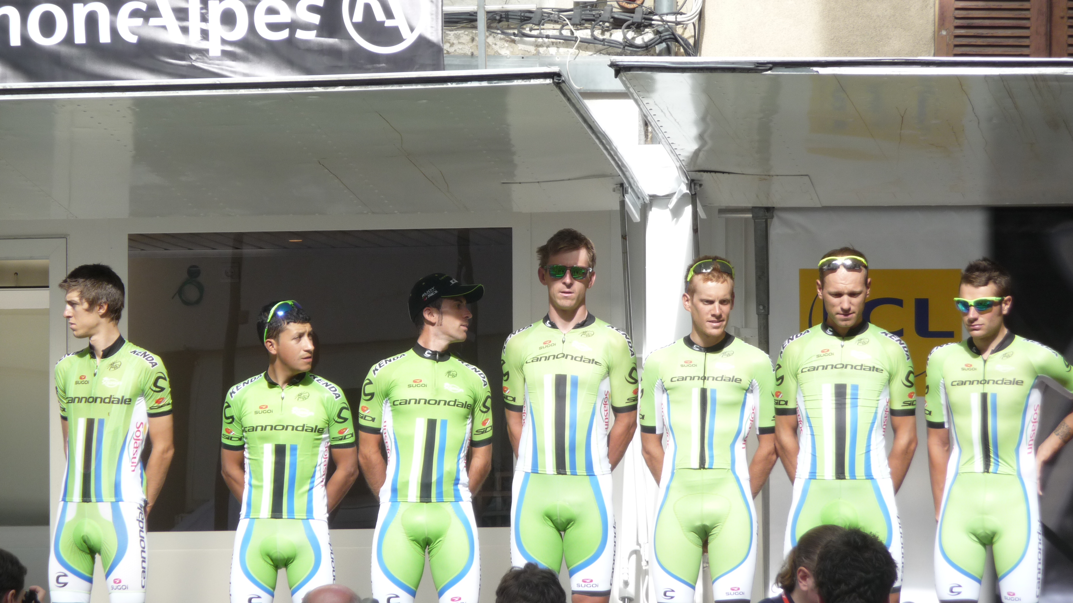 Présentation des équipes du Critérium du Dauphiné 2014 lors du départ de la 2ème étape à Tarare.